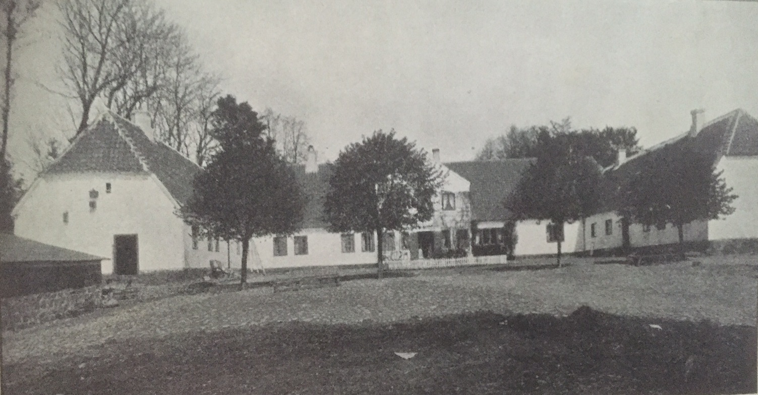 Store Hovedgård. Hovedbygning med to sidefløje.